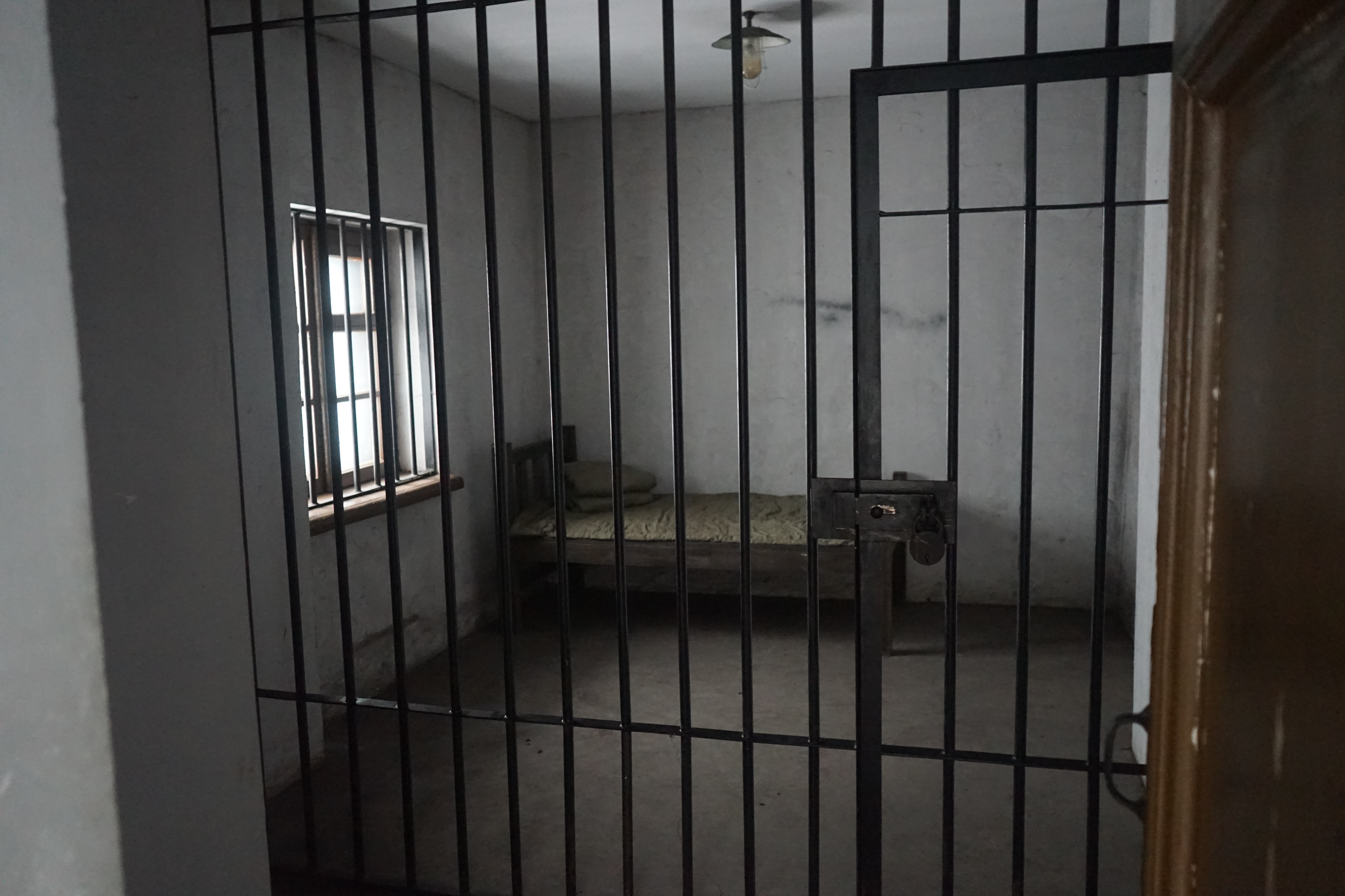 中文（中国大陆）: 临时关押处 1936年7月，赵一曼曾被关押在此